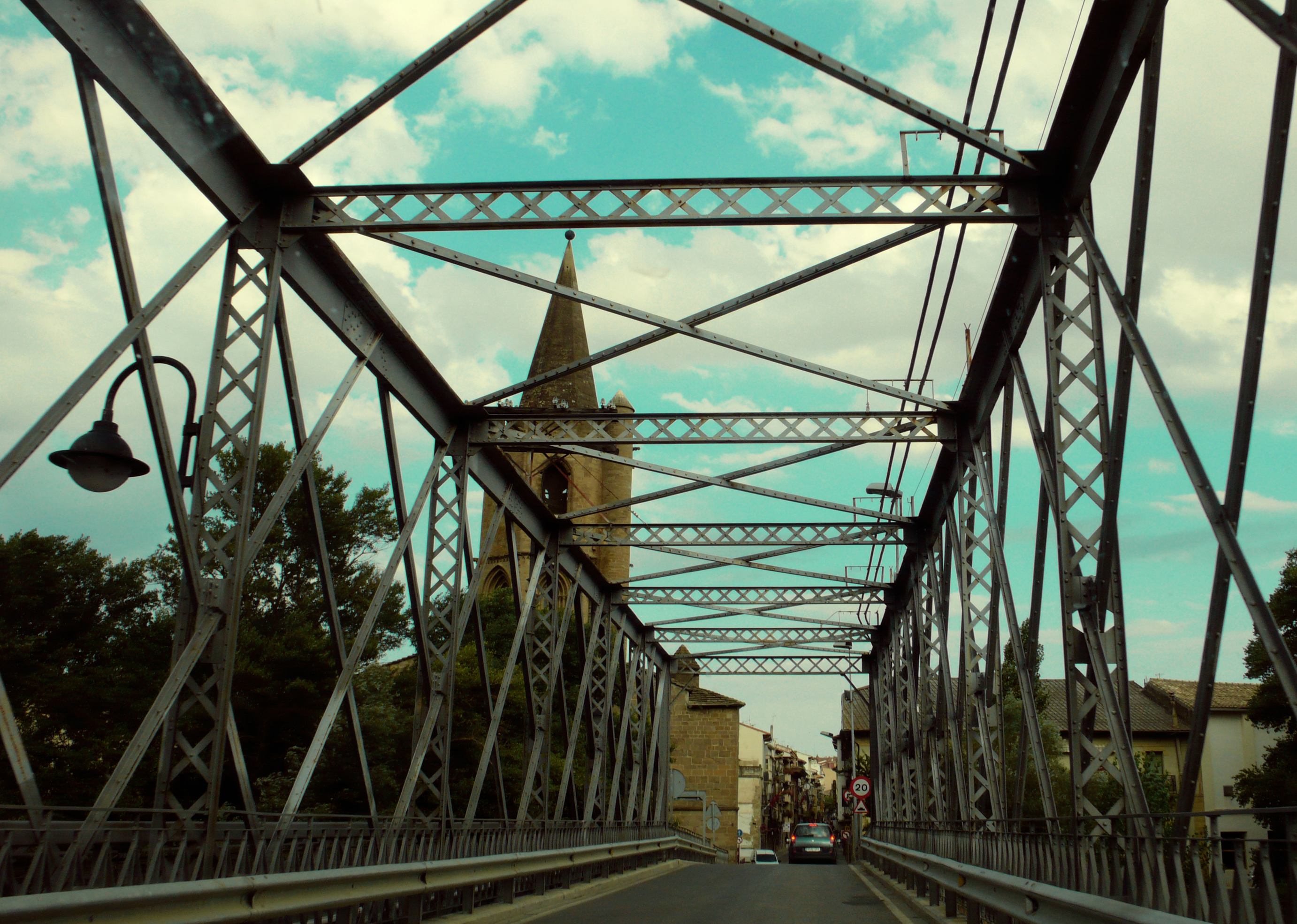 Iglesia Sta María. Sangüesa. Navarre